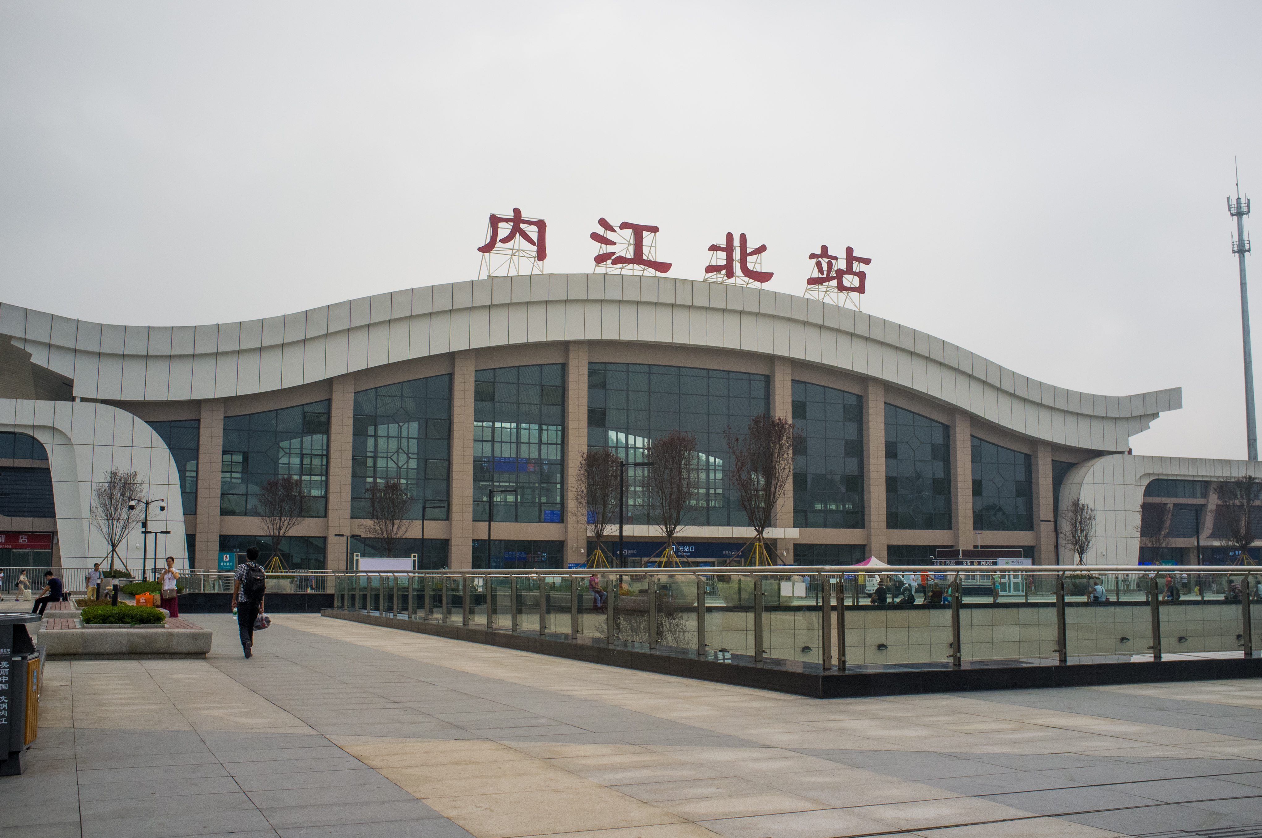 中文（中国大陆）: 成渝客专内江北站